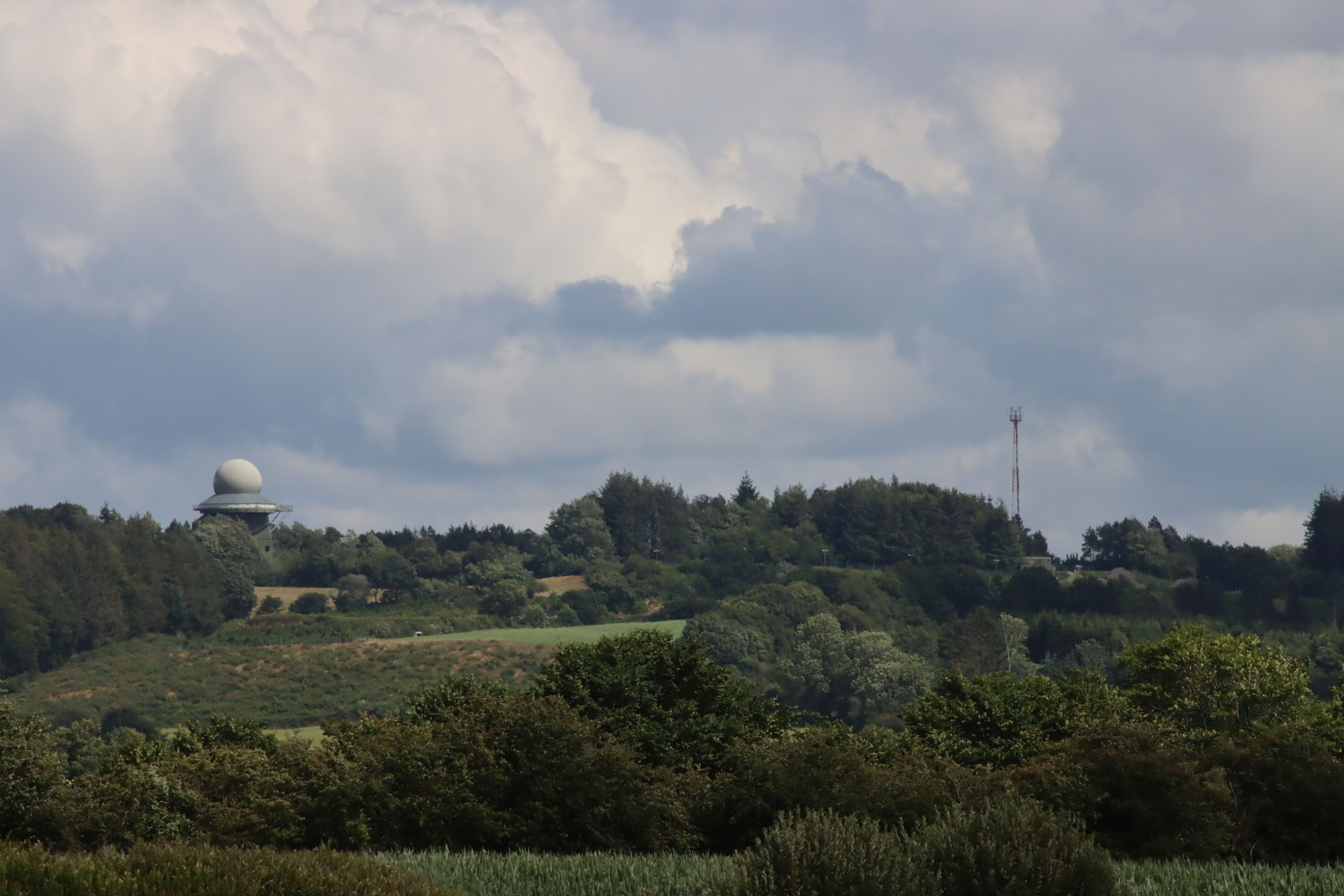 Blick auf das GM 406F Radar der Bundeswehr (Luftwaffe) auf einer Erhöhung bei Brekendorf.